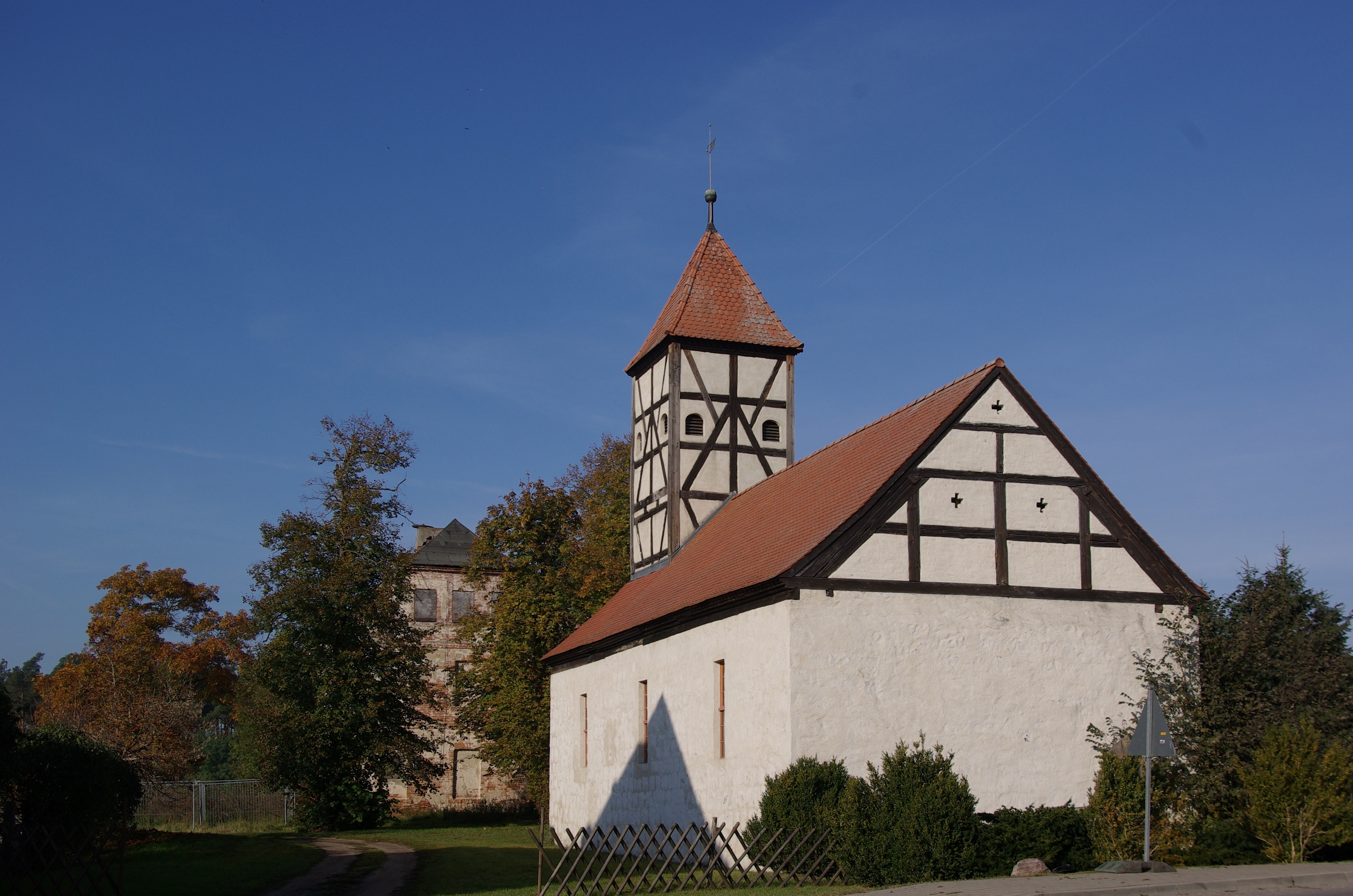 Brandenburg an der Havel Ortsteil Mahlenzien. Die Kirche ist denkmalgeschützt. Sie wurde im 13. Jahrhundert erbaut.